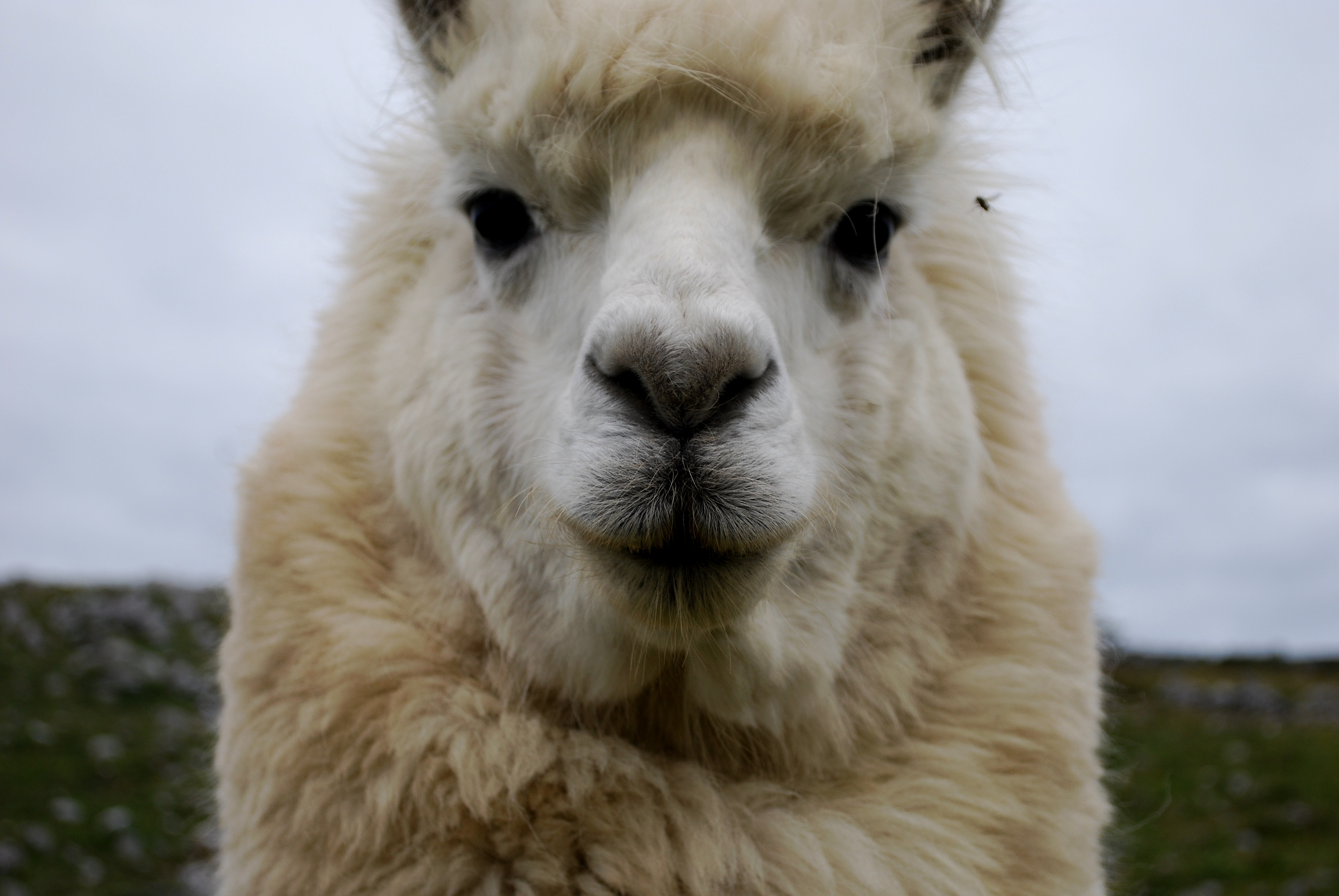 Lama glama - Ireland